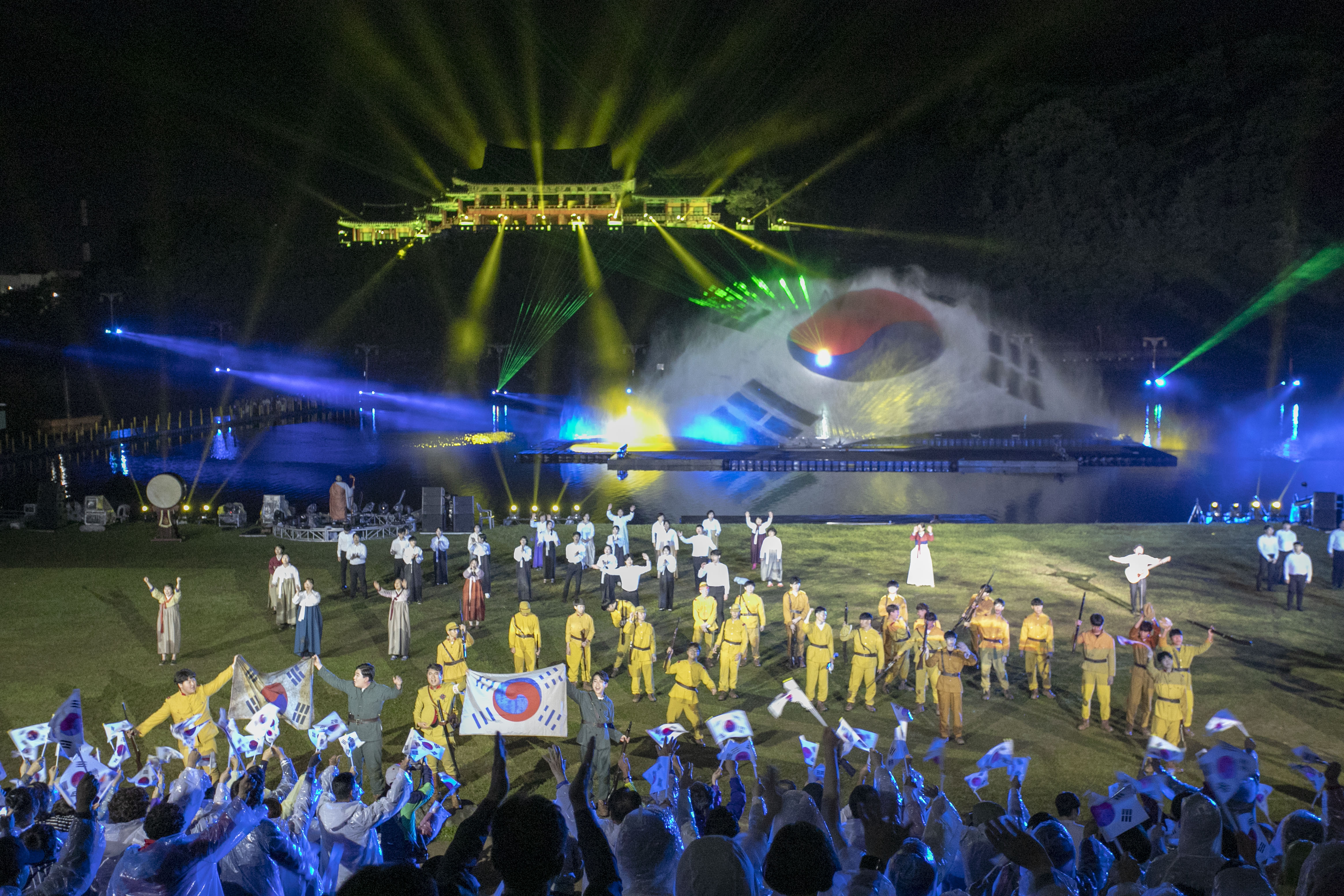 밀양아리랑대축제의 하이라이트 밀양강 오딧세이